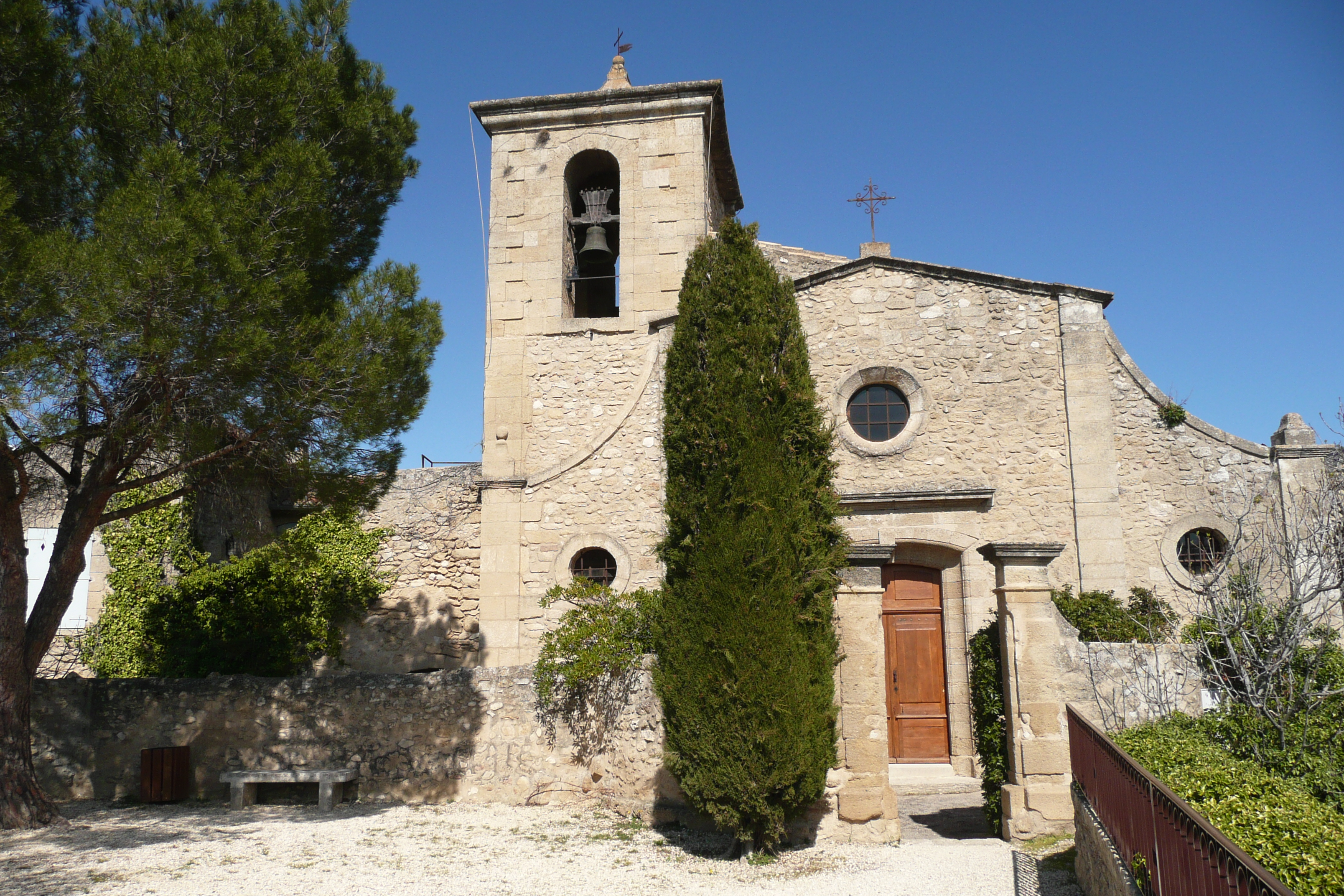 Eglise de Taillades.